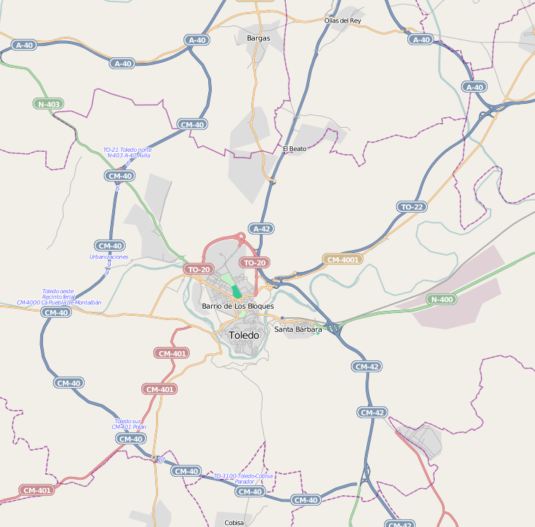 Trazado de la autovía autonómica de Castilla La Mancha CM-40 (Ronda Suroeste de Toledo)